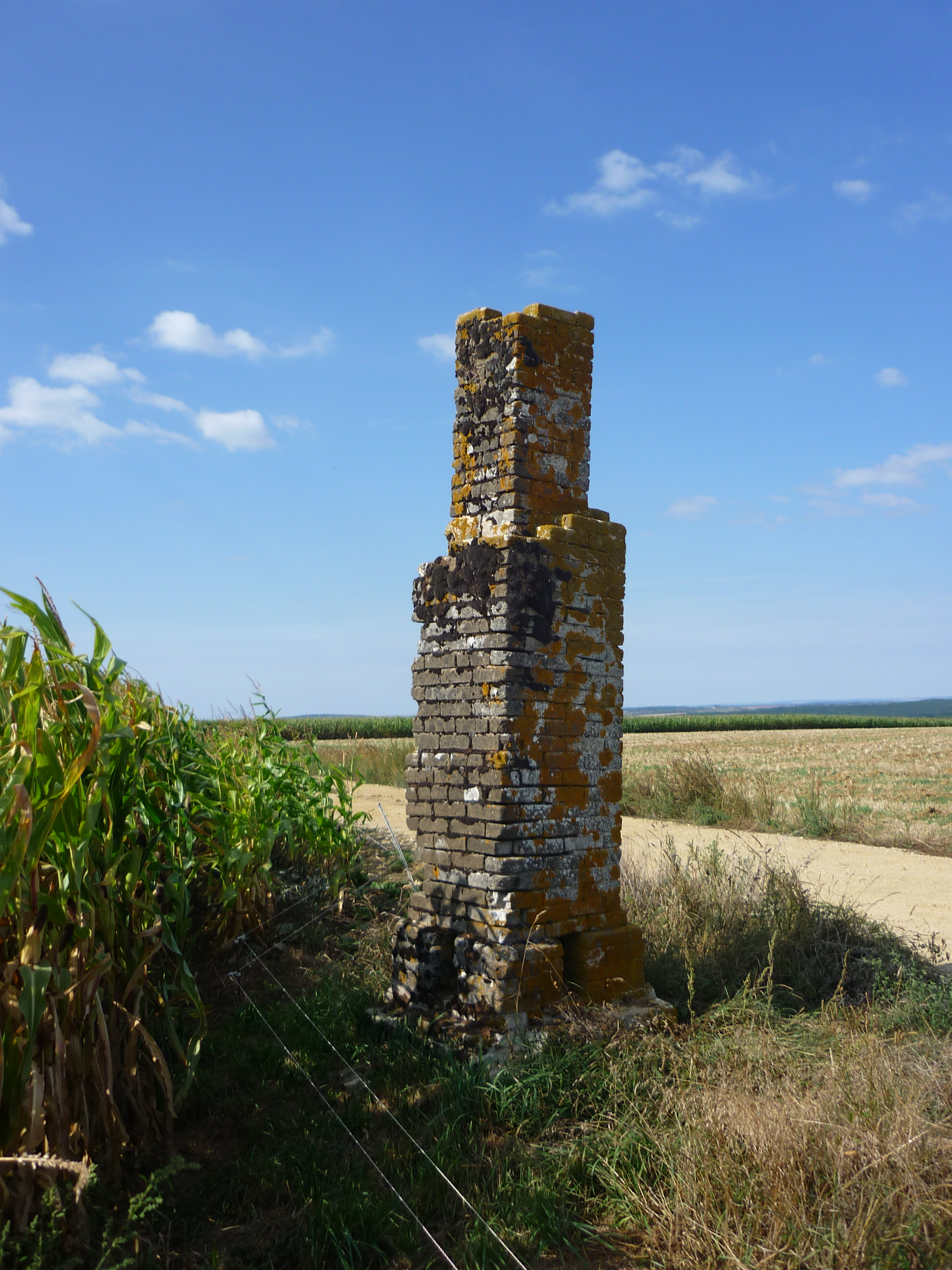 Cheminée géodésique de Rehaincourt, à la limite avec Ortoncourt (voyez fiche 8837901 de l'IGN). Vue de l'extérieur de l'édifice.